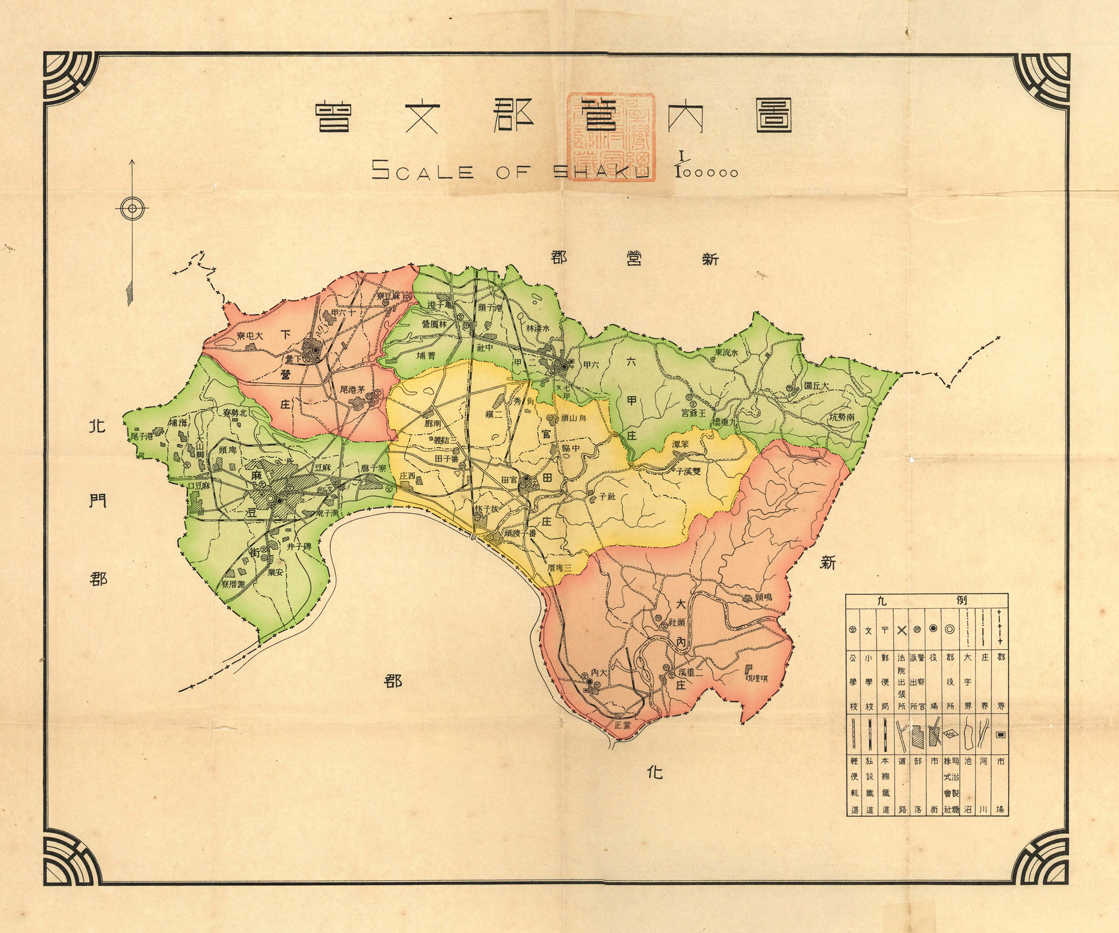 中文（台灣）: 臺南州曾文郡轄下有麻豆街、下營庄、六甲庄、官田庄、大內庄